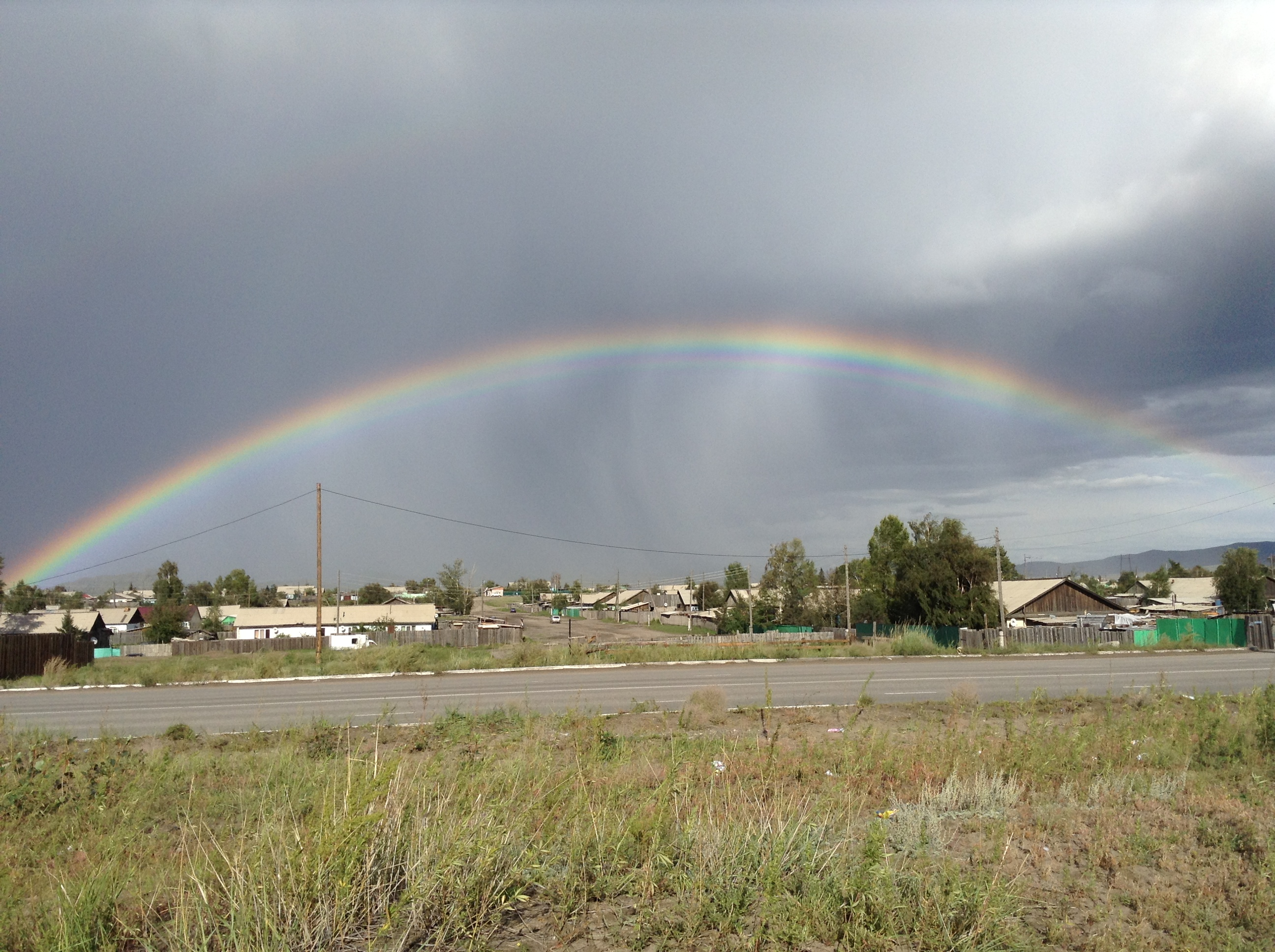 Тыва дыл: Шагонар, 2013 чыл. Шагаан-Арыгже кирер орук талазындан.